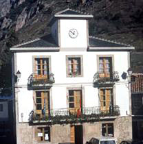 Imagen del ayuntamiento de Somiedo